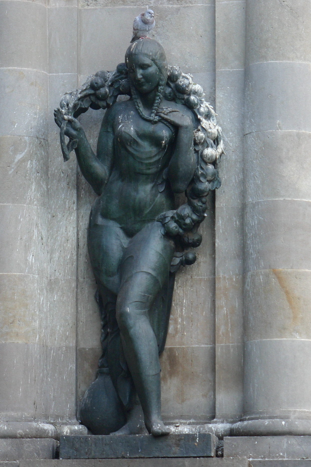 2015-1. Pomona. Plaza Catalunya, Barcelona (Spain)